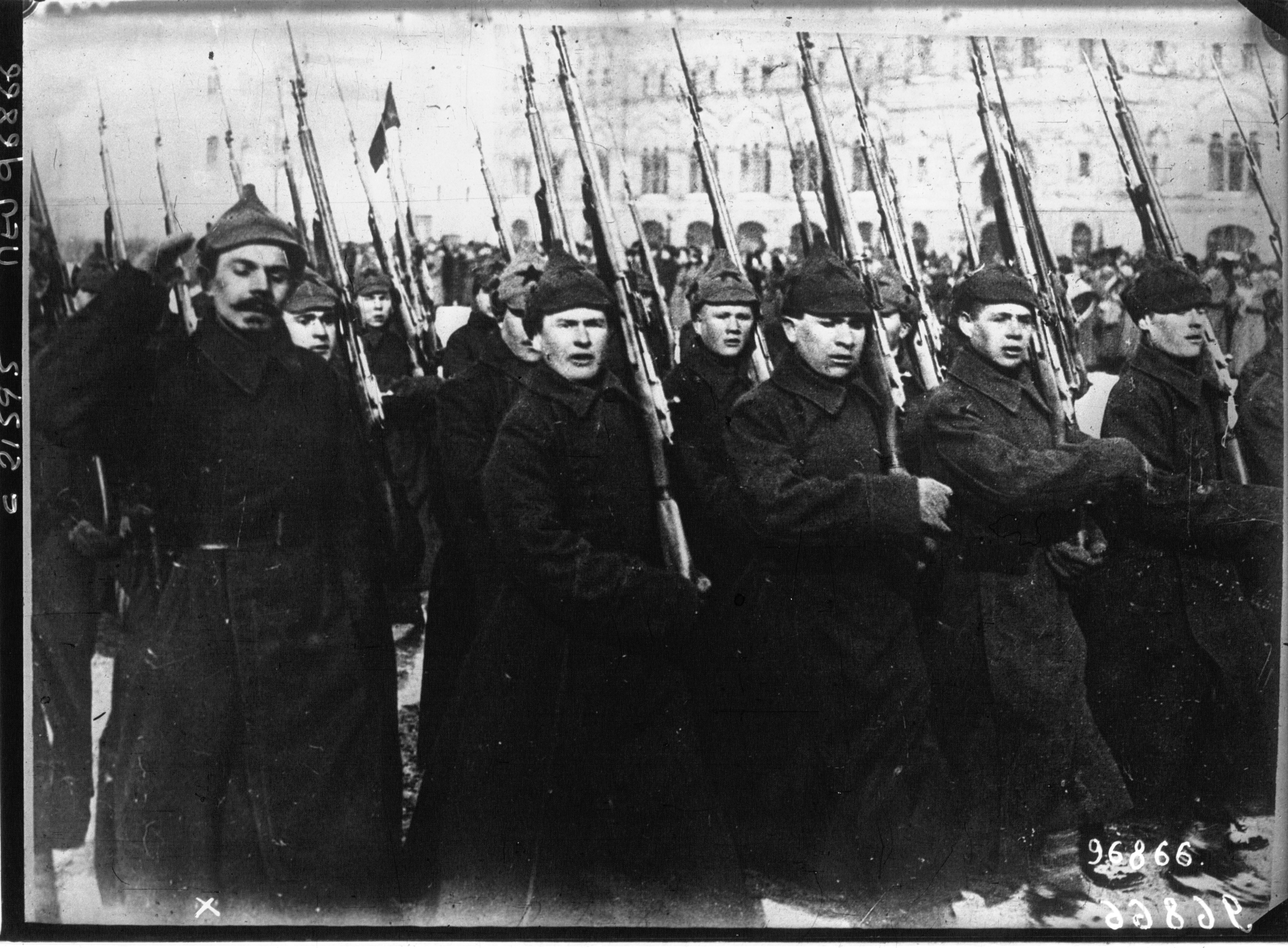 Desfile de infantería del Ejército Rojo en Moscú ante Trotski, 1922.